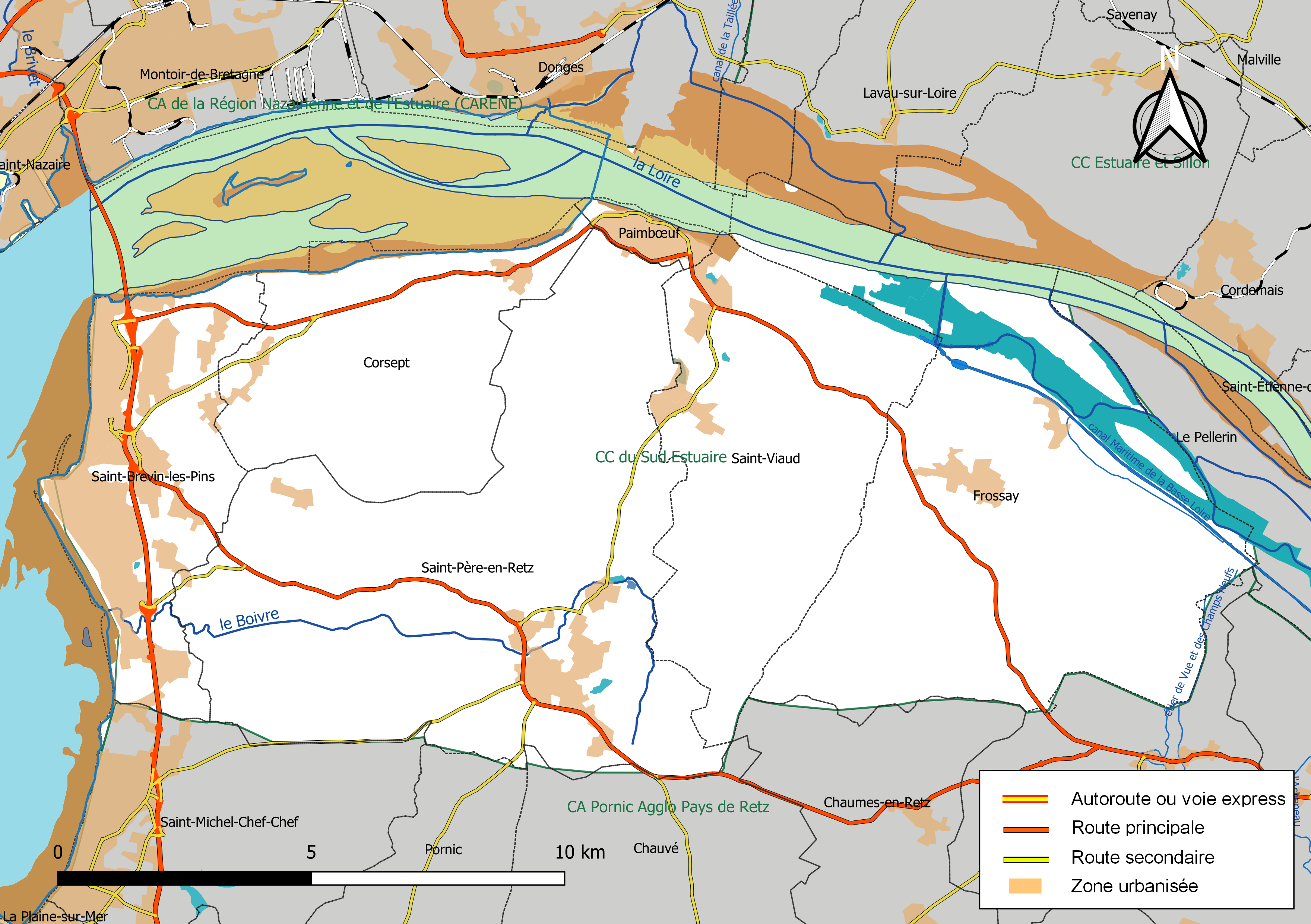 Carte géographique de la Communauté de communes du Sud Estuaire, département de la Loire-Atlantique, France. Composition au 1er janvier 2019.